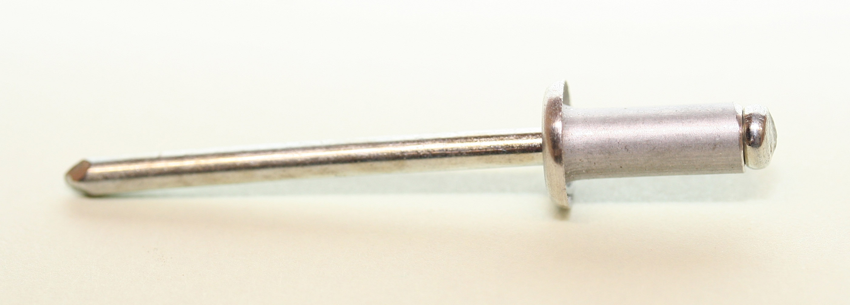 Sujet:Blannnitt.